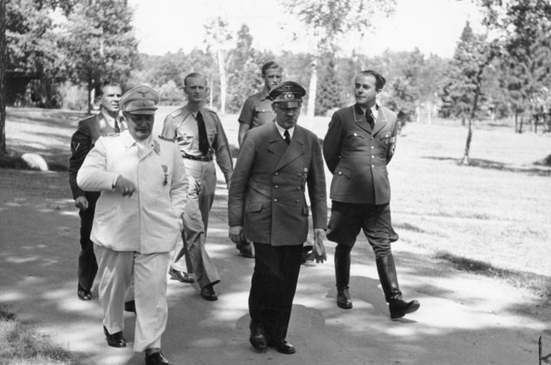 Besprechung im Führerhauptquartier